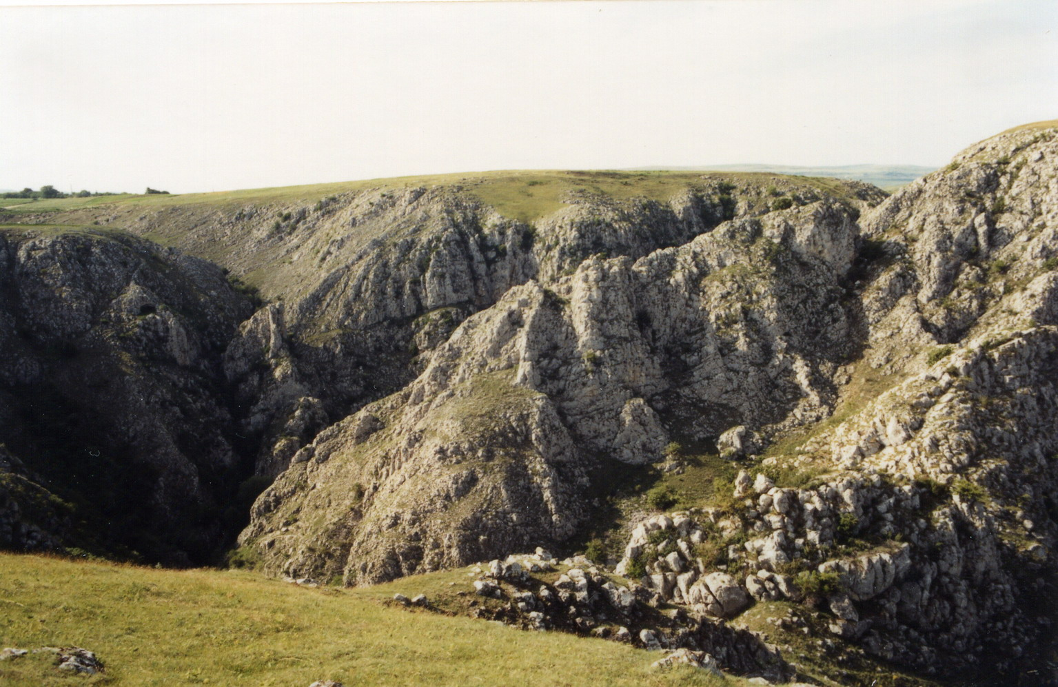 Cheile Turului (vedere de pe versantul sudic)